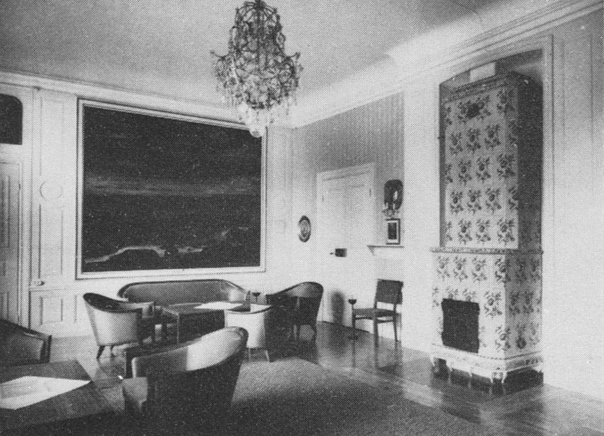 Salen i övre våningen på Vällinge